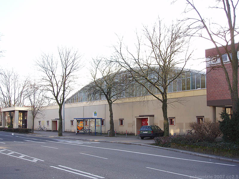 Mönchseehalle in der Karlstraße 46 in Heilbronn